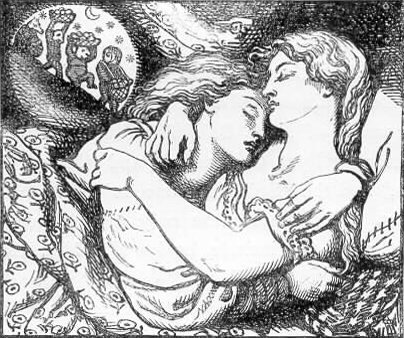 Ilustração para livro de poemas de sua irmã Christina Rossetti